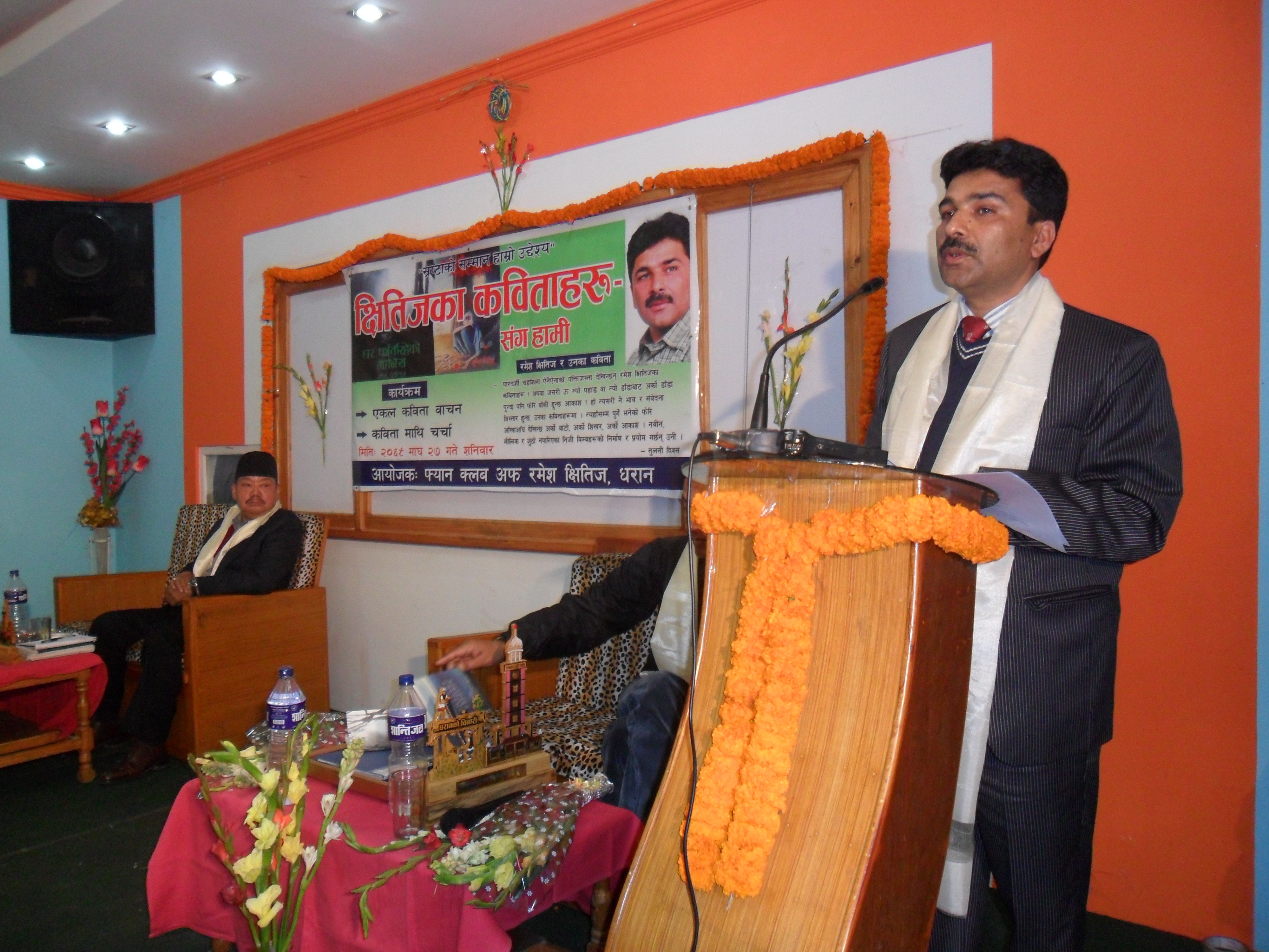 नेपाली: Nepali